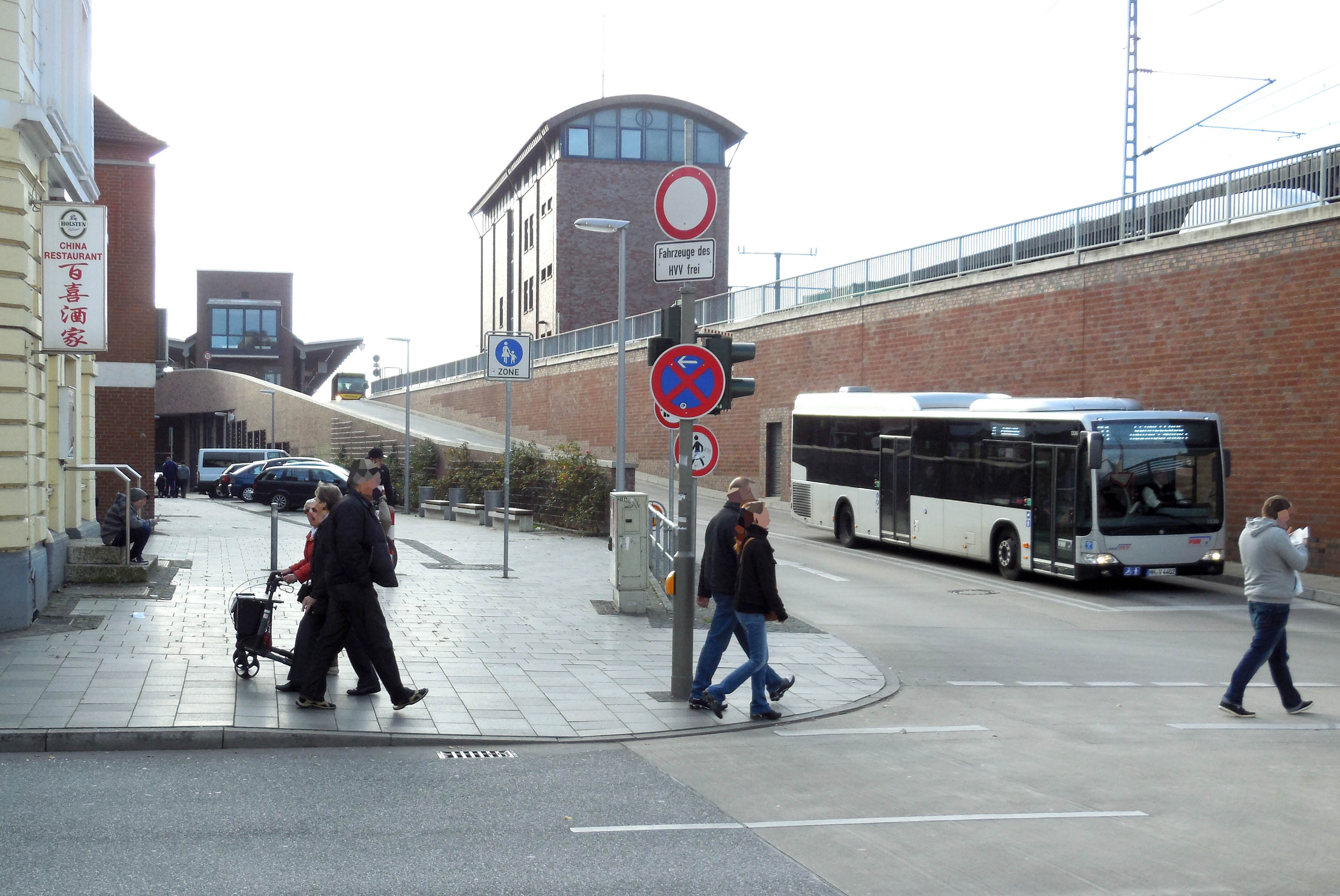 Bahnhof Bergedorf Stellwerk und Bus-Aufffahrrampe Ostseite